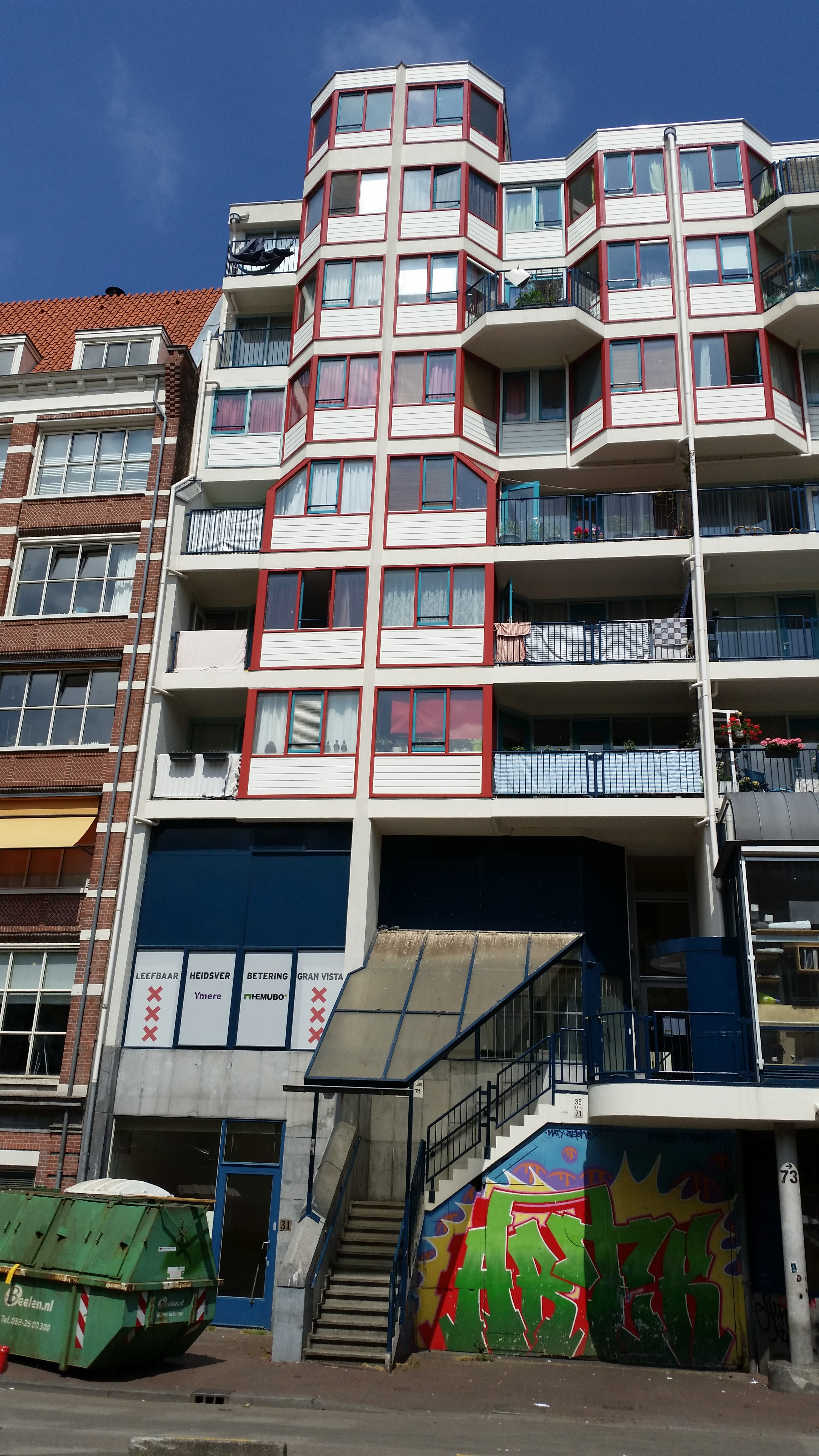 Gran Vista, Amsterdam, gevelwand Waterlooplein